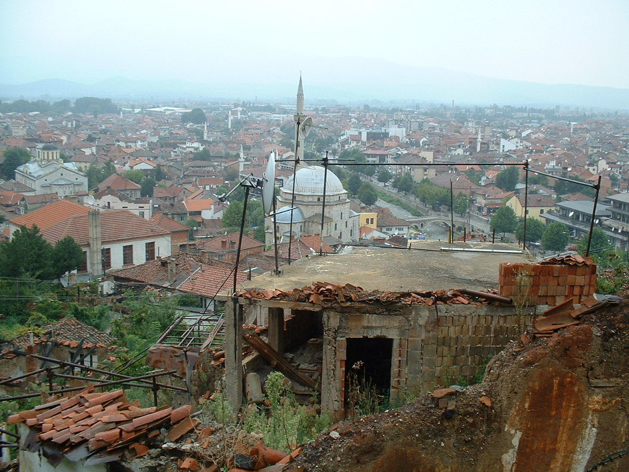 Prizren Altstadt, Serbenviertel